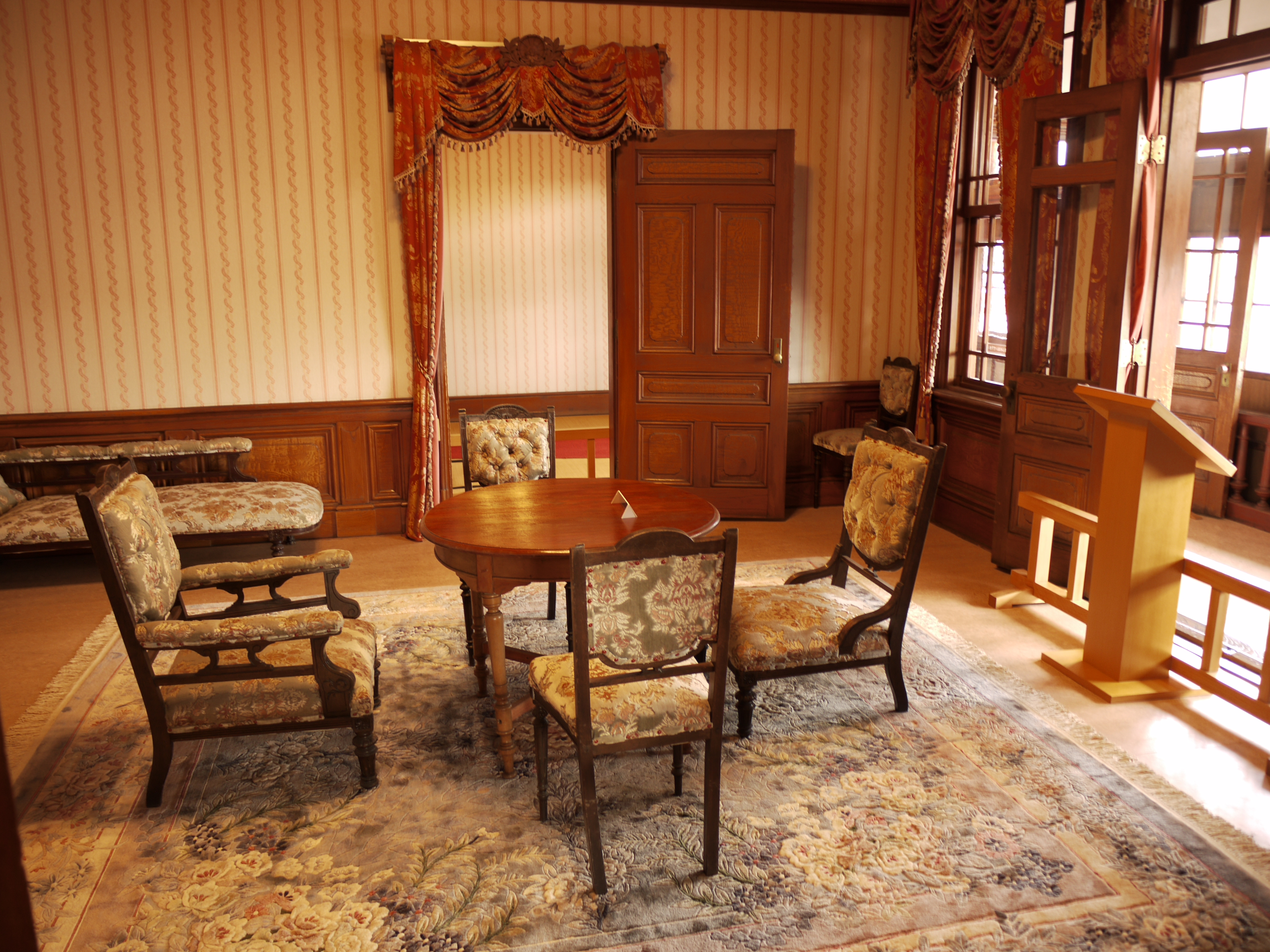 太宰治記念館 「斜陽館」二階の様子 2F